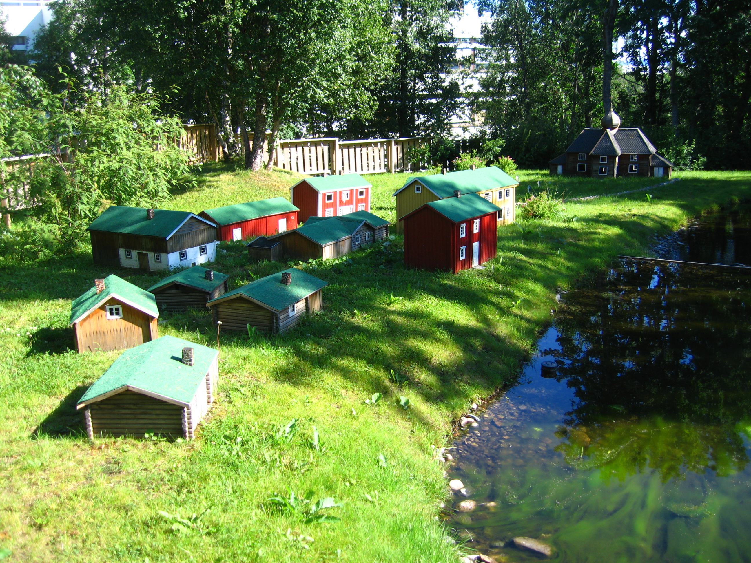 Modell av Lenvik kirkested, plassert i parken på Finnsnes.